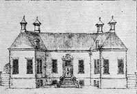 Huis Bijma, afgebroken in 1860